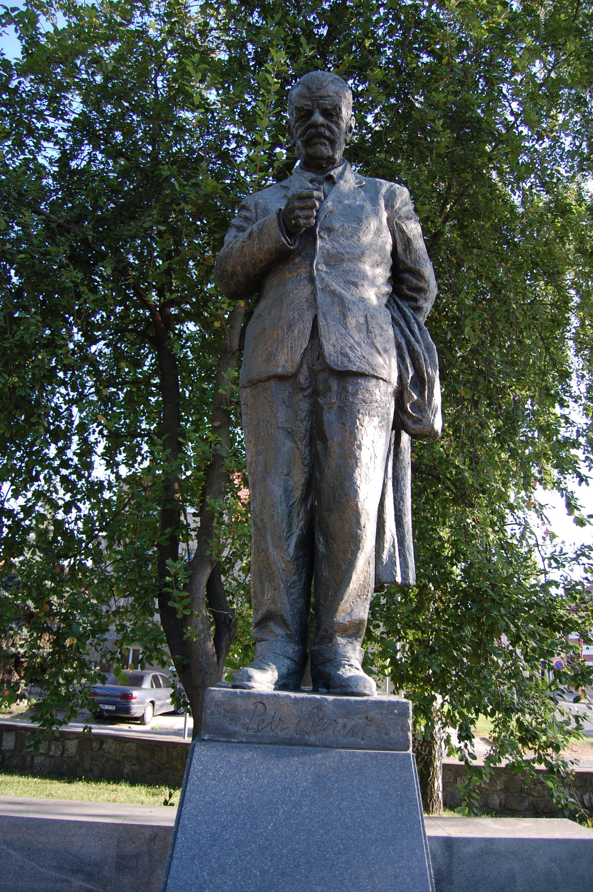 akad. sochař a malíř Karel Otáhal (1901–1972): Petr Bezruč (pomník odhalen v r. 1967) [1] - čelní pohled, Kostelec na Hané, okres Prostějov